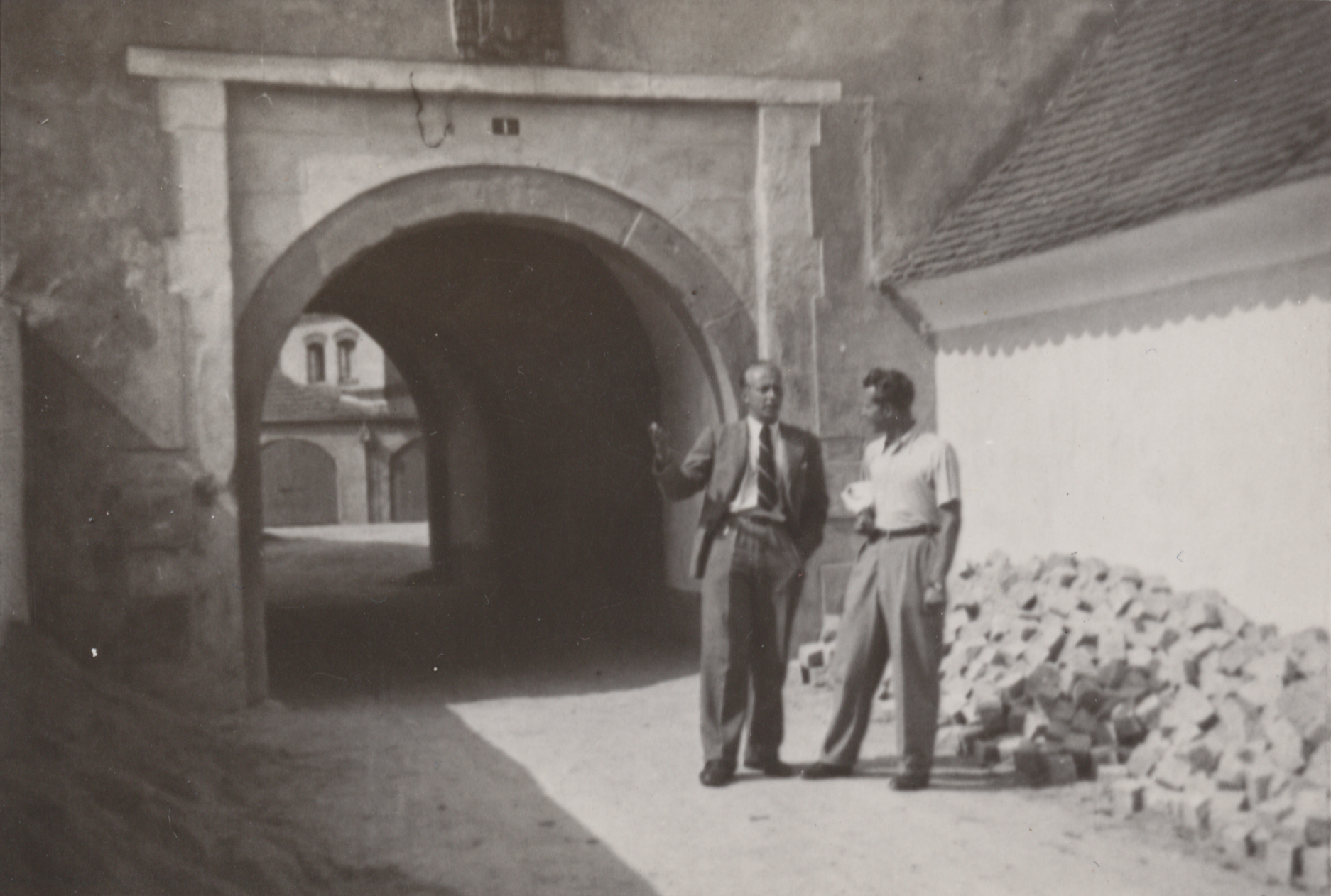 Jeřábek a František Lízl před branou zámku Rožmitál, 1939